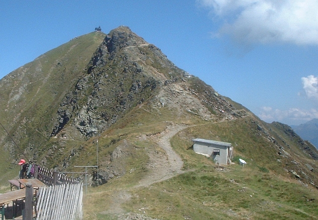 Kellerjoch in the Tuxer Alps; view from the (neue) Kellerjochhütte ([new] Kellerjoch hut) from app. WSW